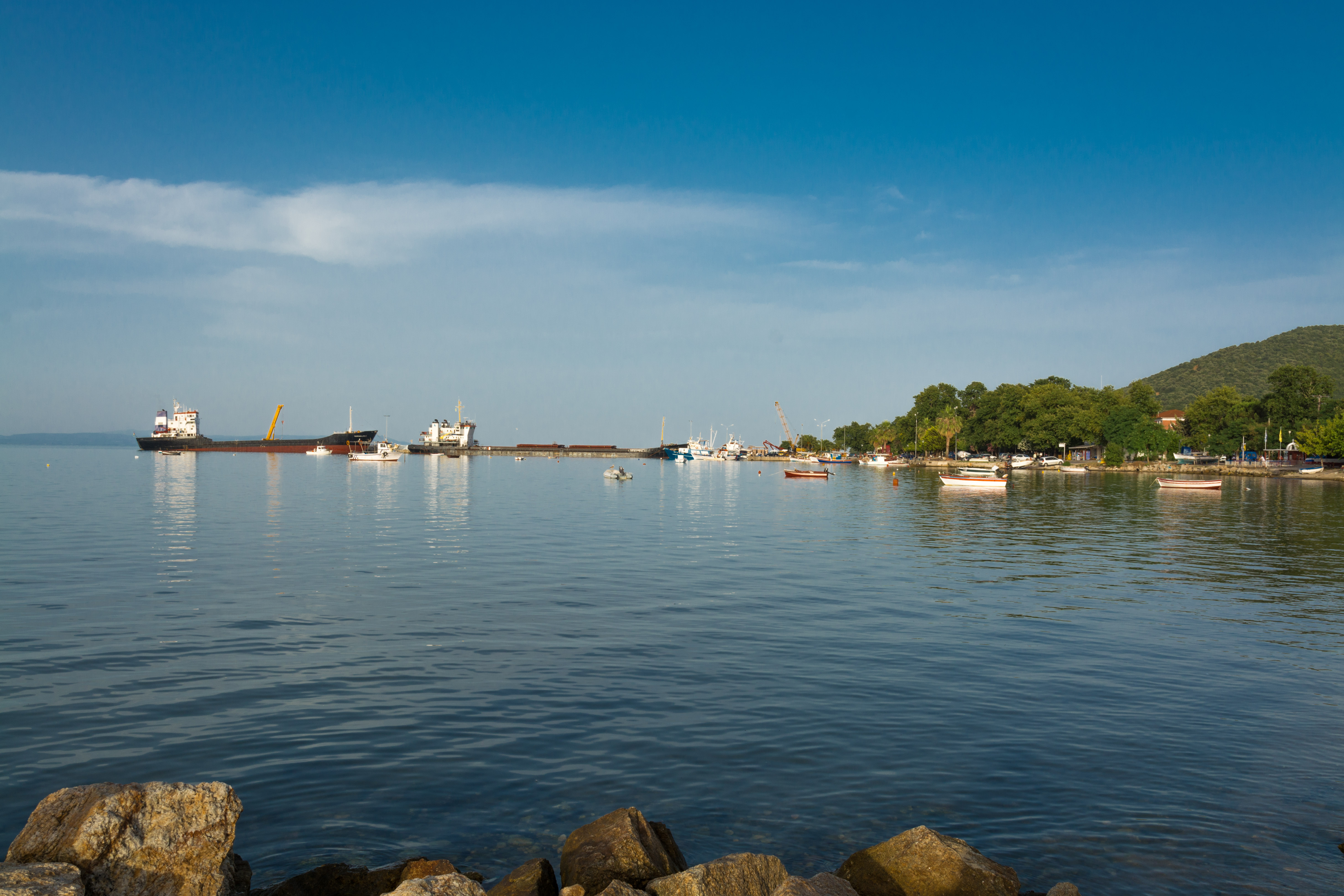 Σταυρός